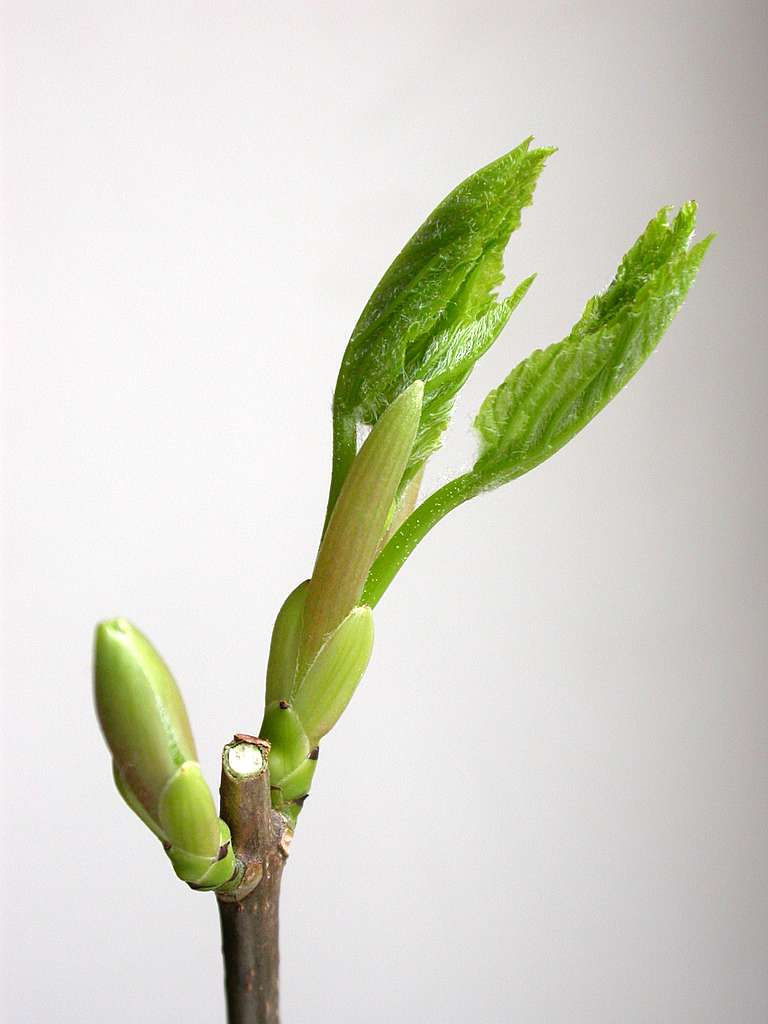 Débourrement d'une feuille de Acer pseudoplatanus (érable sycomore) - Maple budding